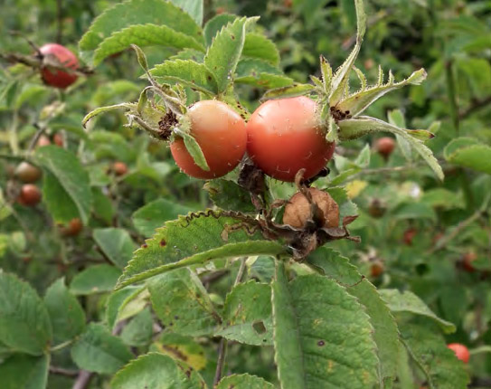 Rosa sherardii